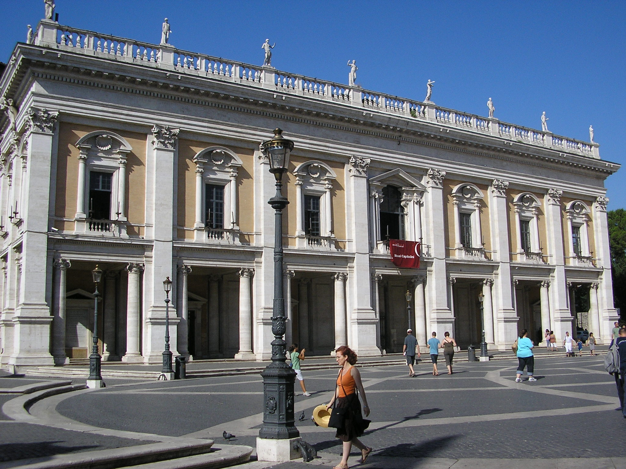 El Palacio Nuevo, uno de los dos edificios que conforman los Museos Capitolinos en Roma.